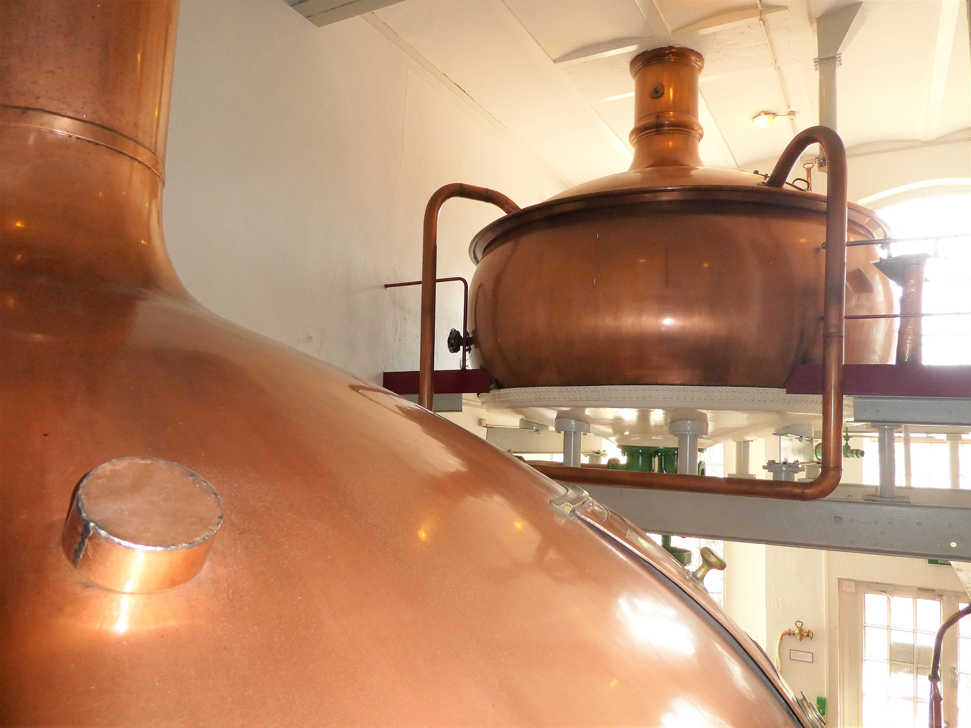 Sudkessel im Brauereimuseum Lüneburg